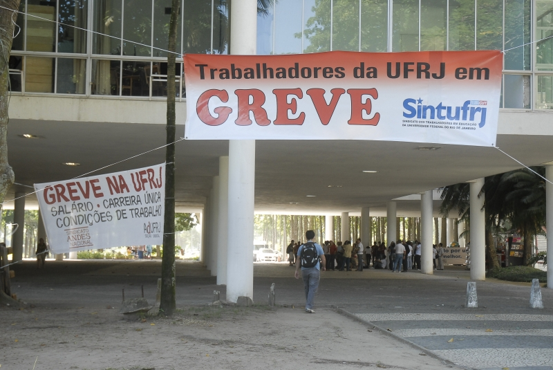 Faixas mostram professores e técnicos administrativos da UFRJ em greve em 2012, ao fundo reunião de pessoas sobre a greve.